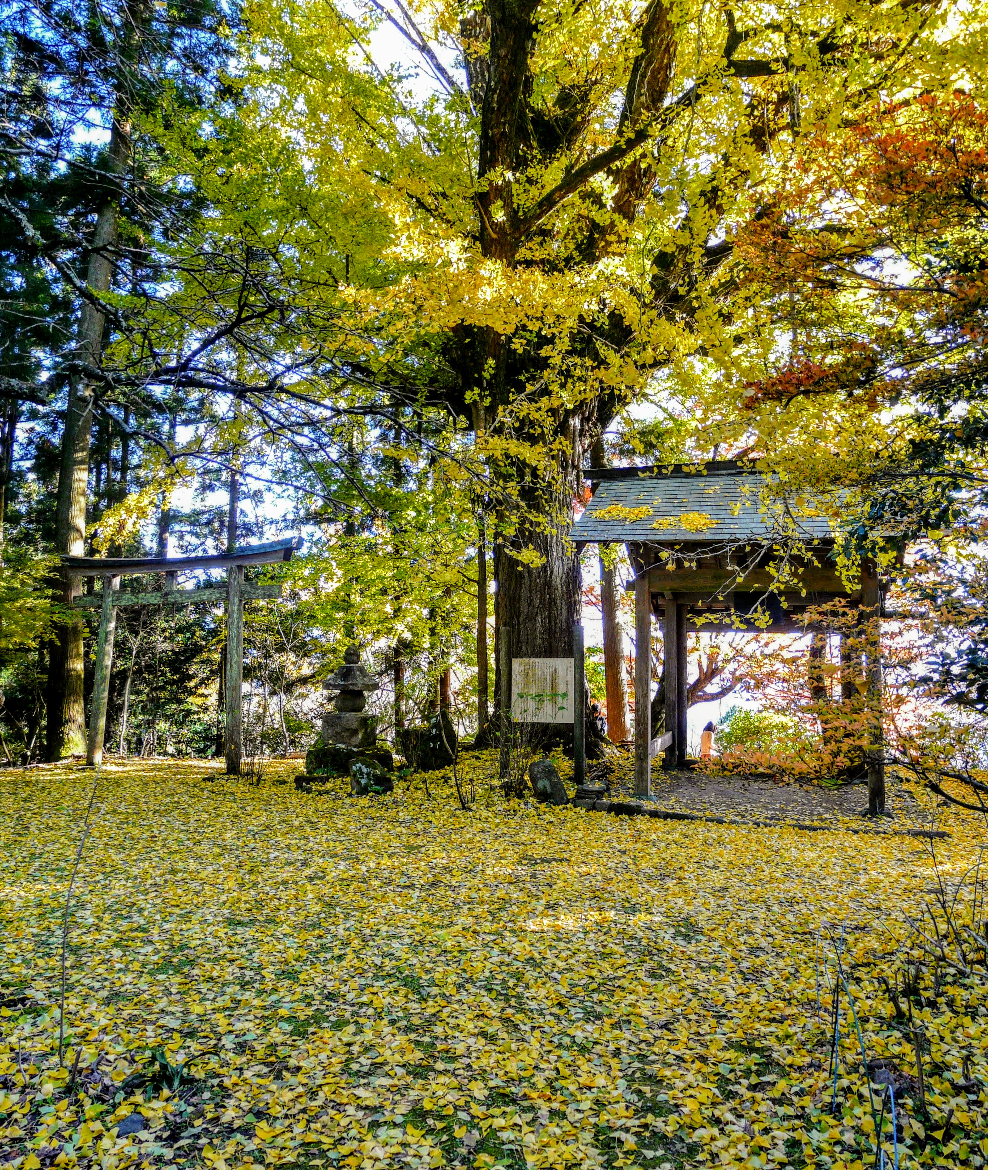 奈良県宇陀市榛原戒場にある戒長寺の紅葉した大イチョウ